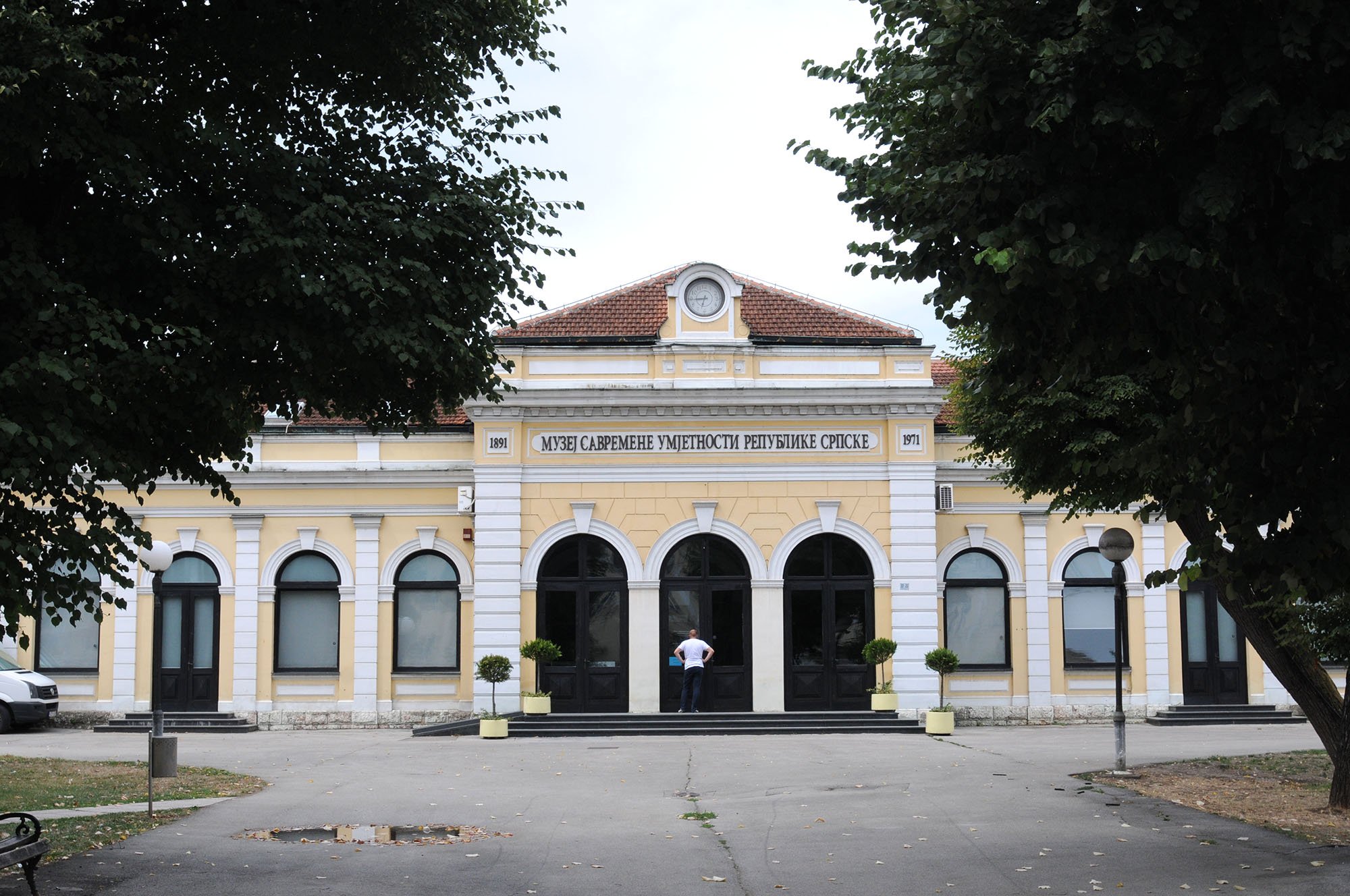 Stara zeljeznicka stanica - muzej savremene umjetnosti bulevar srpske vojske This image was uploaded as part of Trace of Soul 2015.